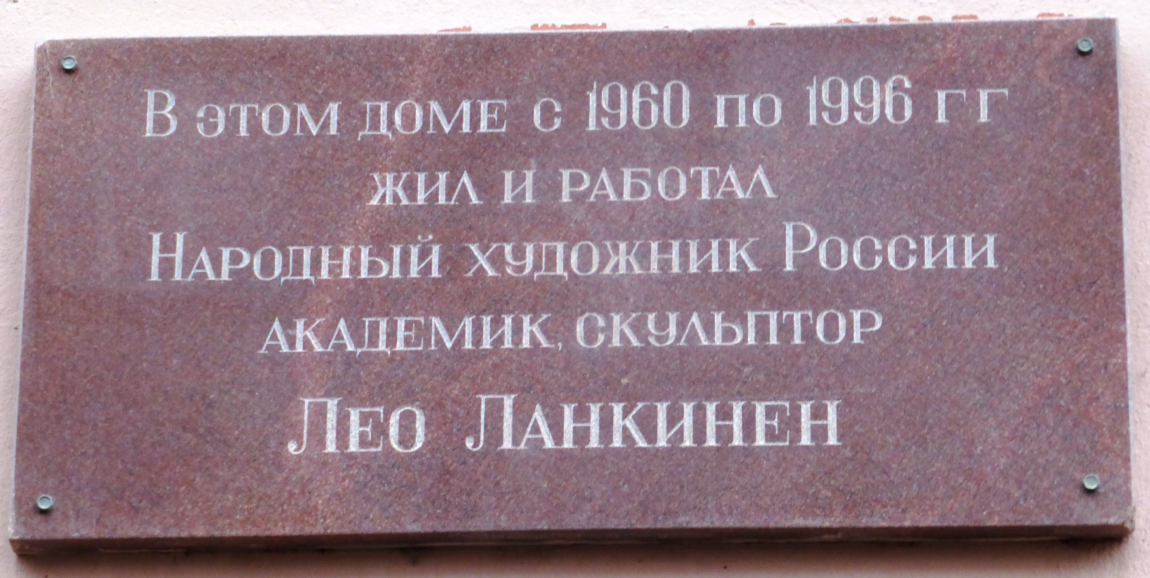 Памятная доска Л.Ф.Лангинену (Ланкинену) в Петрозаводске на ул.Куйбышева, д.16